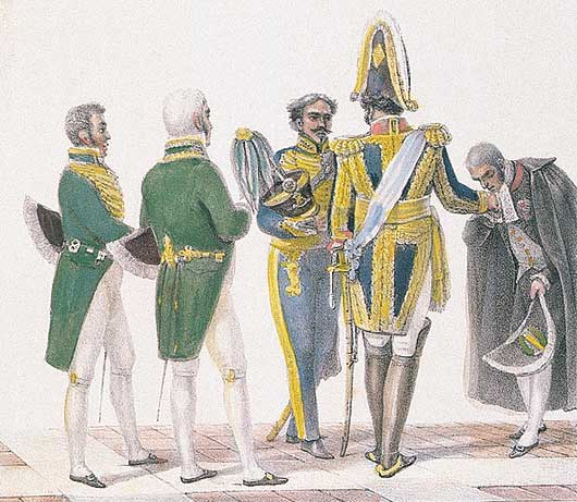 Costume des Ministres, Secrétaires d’État — étude, Aquarelle, 15,3 x 21,7cm